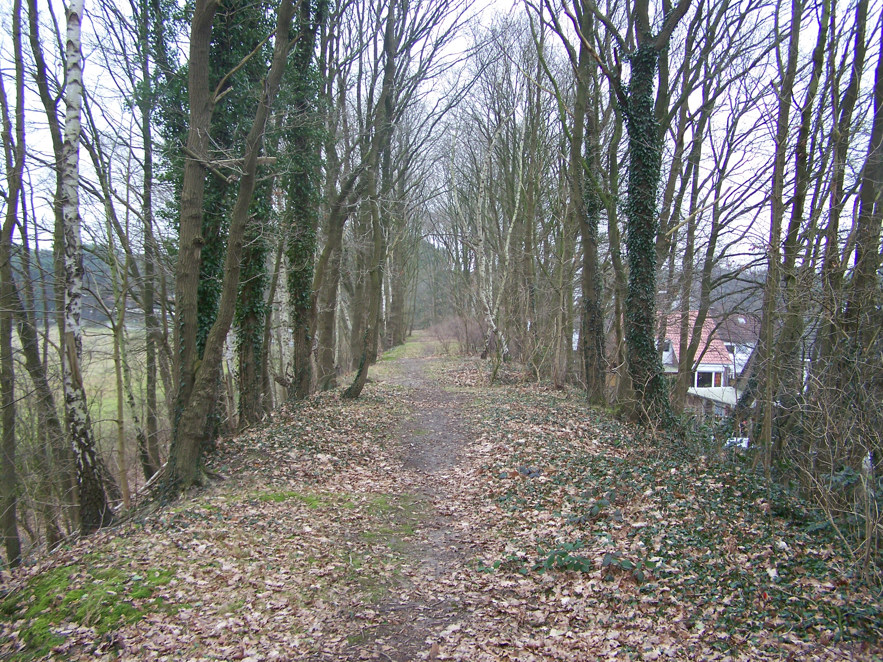 ehemalige Trasse der Kleinbahn Lingen - Berge - Quakenbrück